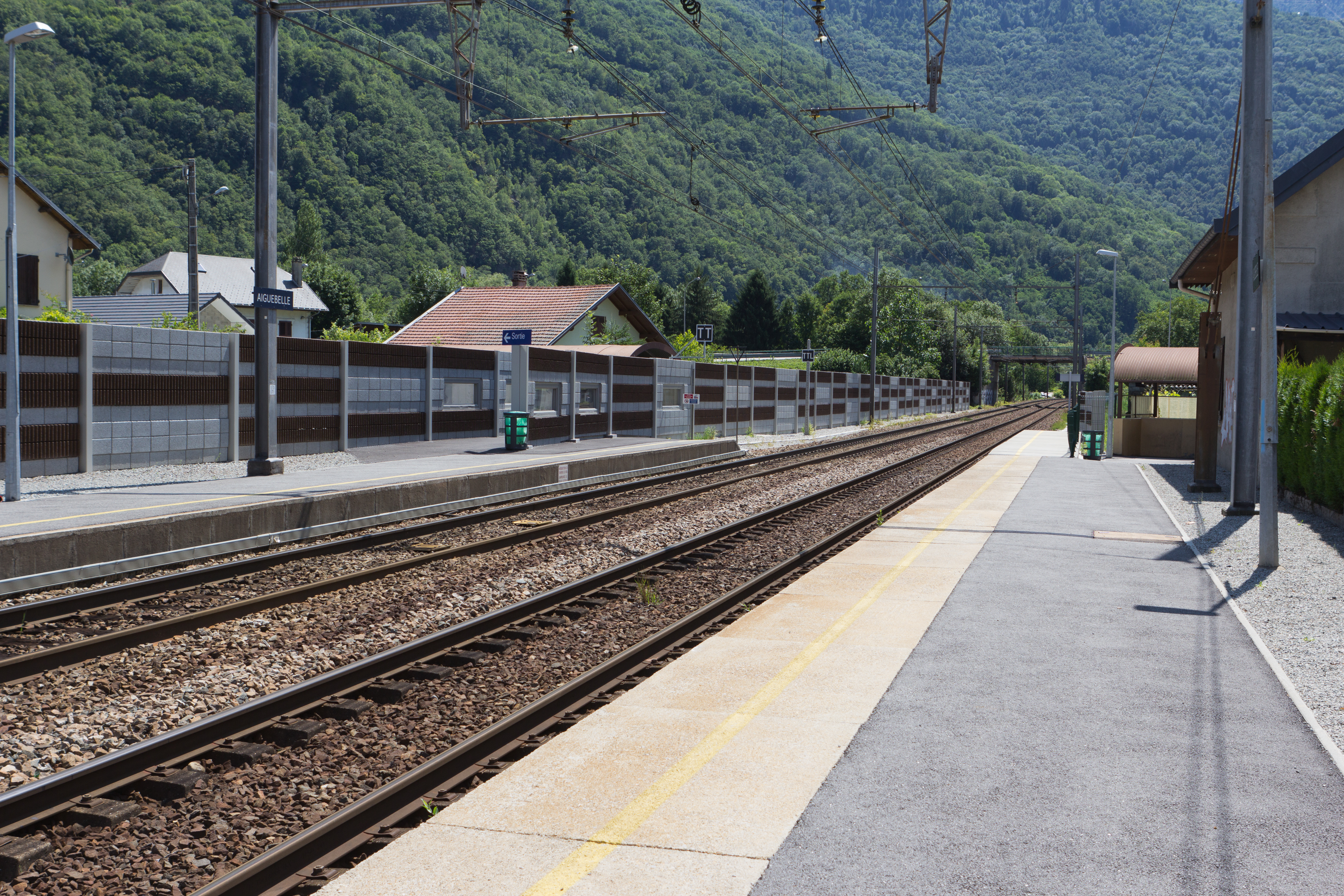 Gare d'Aiguebelle, commune d'Aiguebelle, département de la Savoie, France.